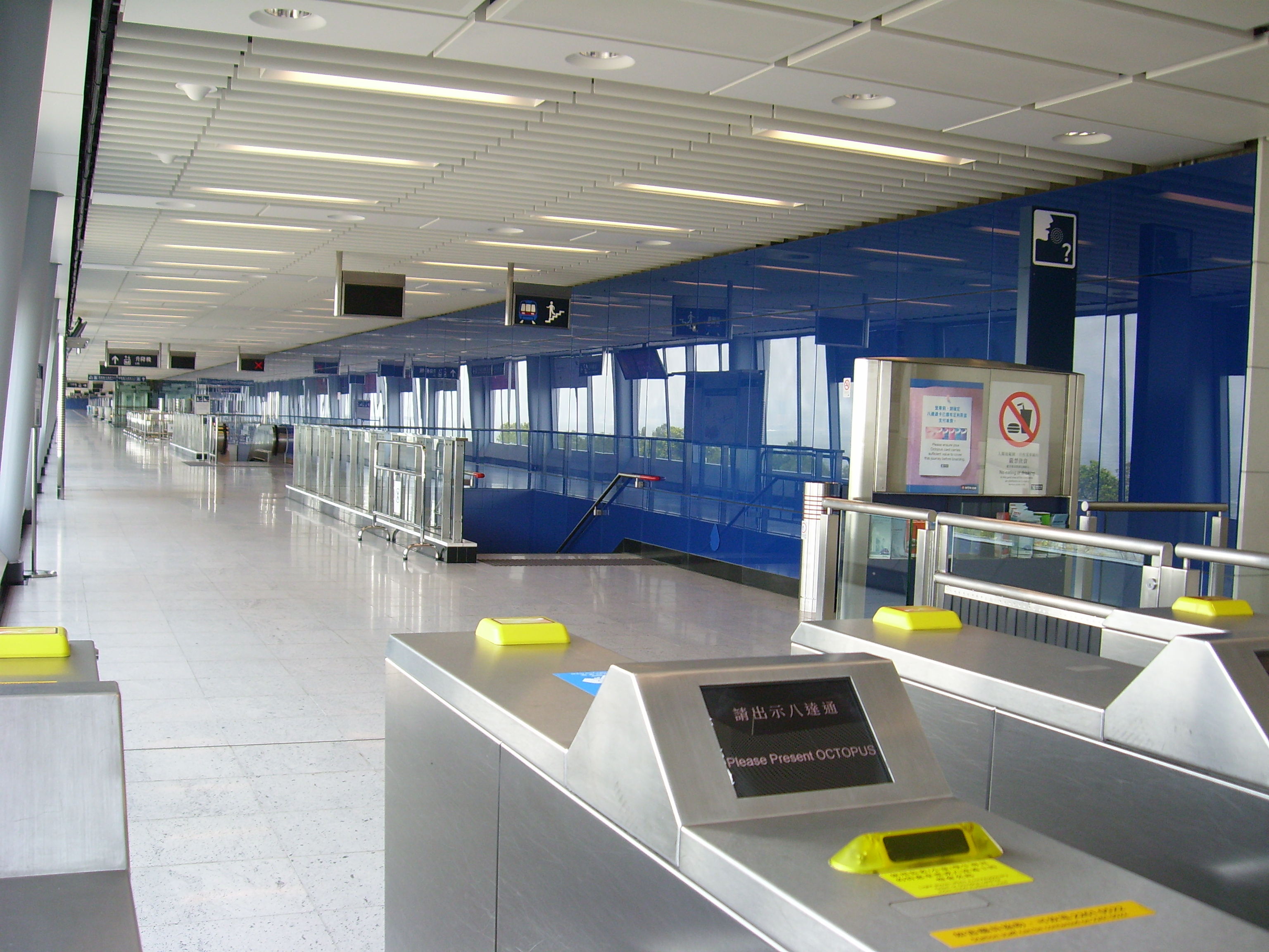 MTR AWE Exit B faregate